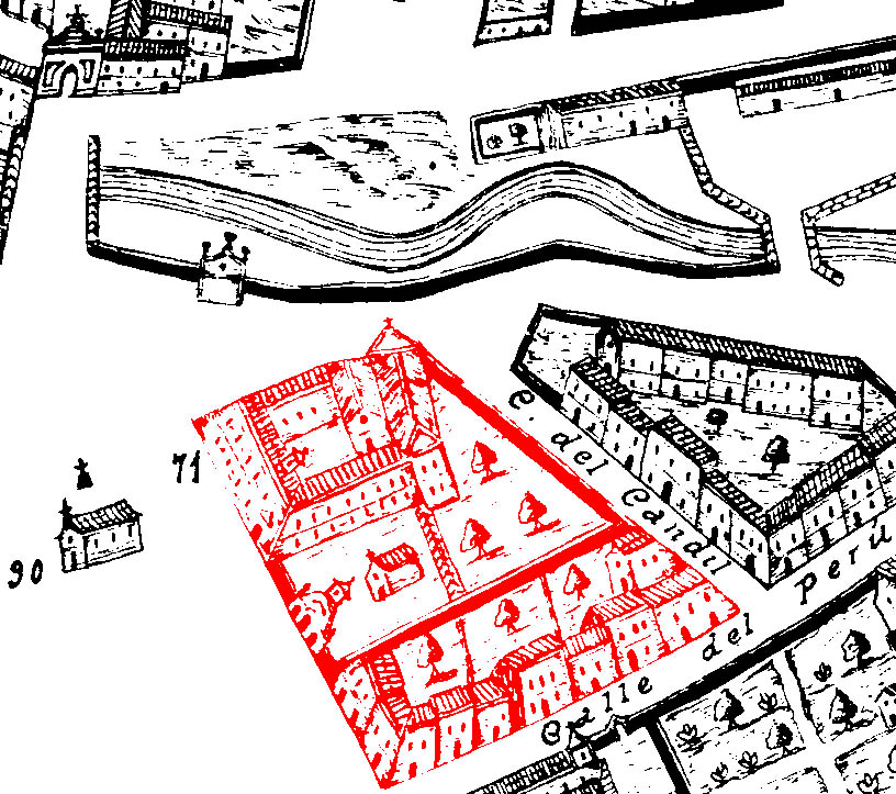 Información parcial del plano de Ventura Seco (1738). Señalado en rojo el edificio ya desaparecido del Hospital de la Resurrección de la ciudad de Valladolid en España.